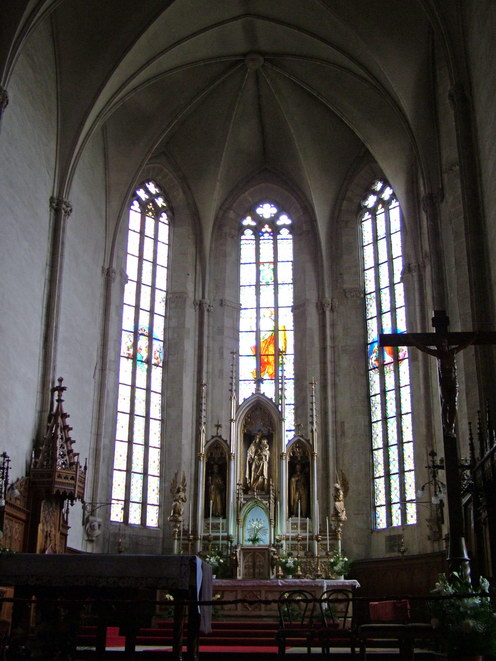 Kolozsvár - Szent Mihály-templom - szentély